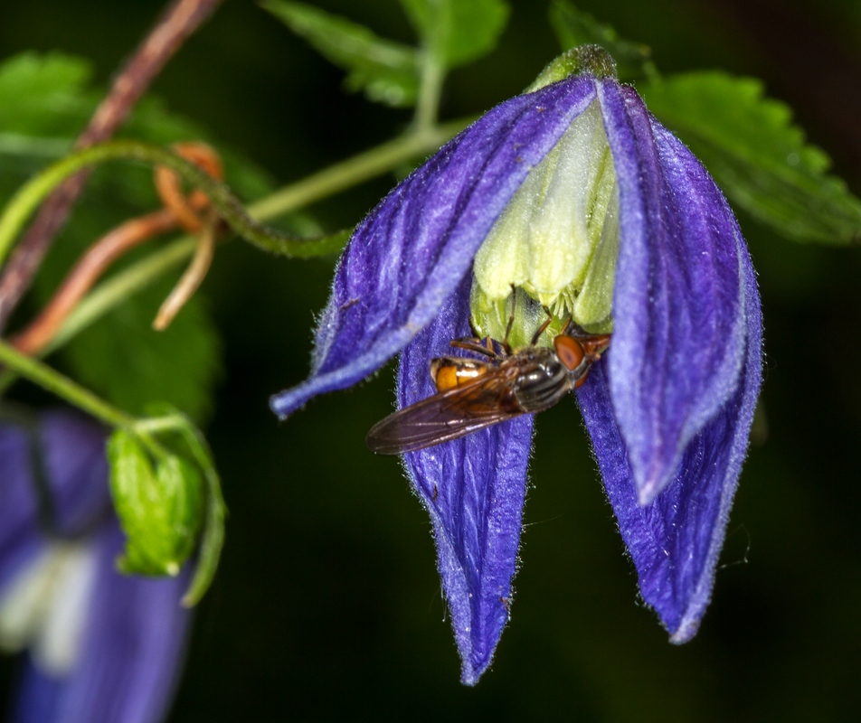 Alpen-Waldrebe im Seebachtal (ca. 1250 m ü. M.)